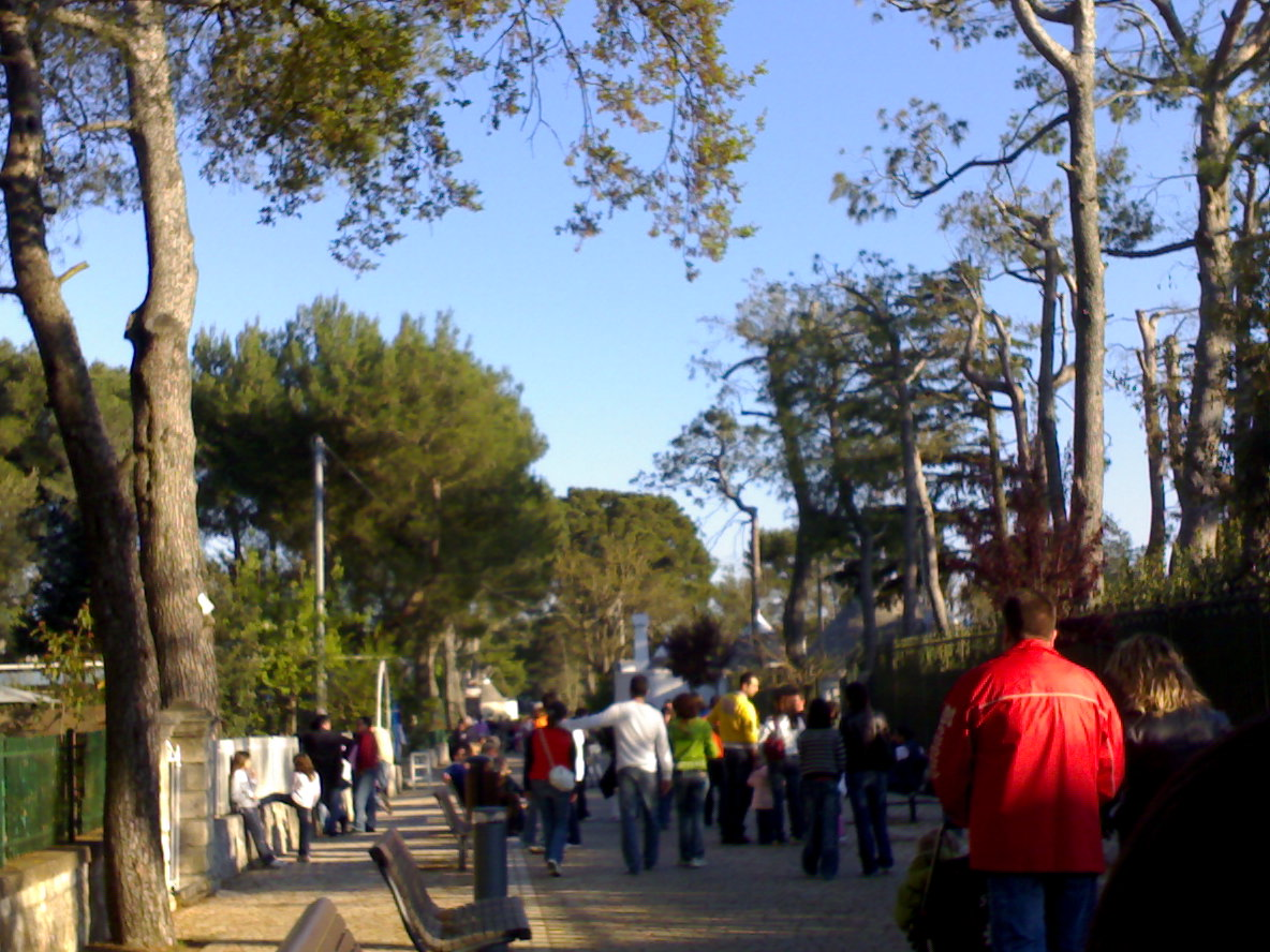 Foto di Viale Toledo, Selva di Fasano (BR)